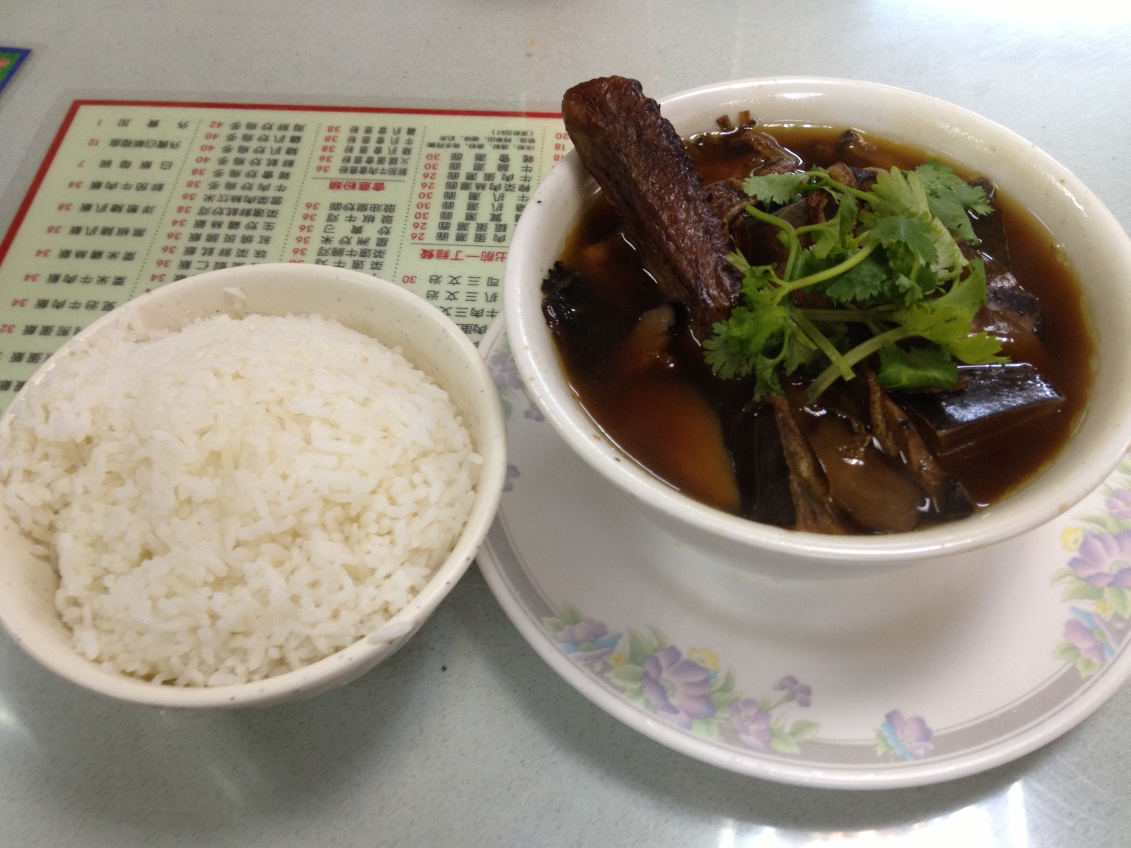 中文（香港）: 鴨腿湯配飯